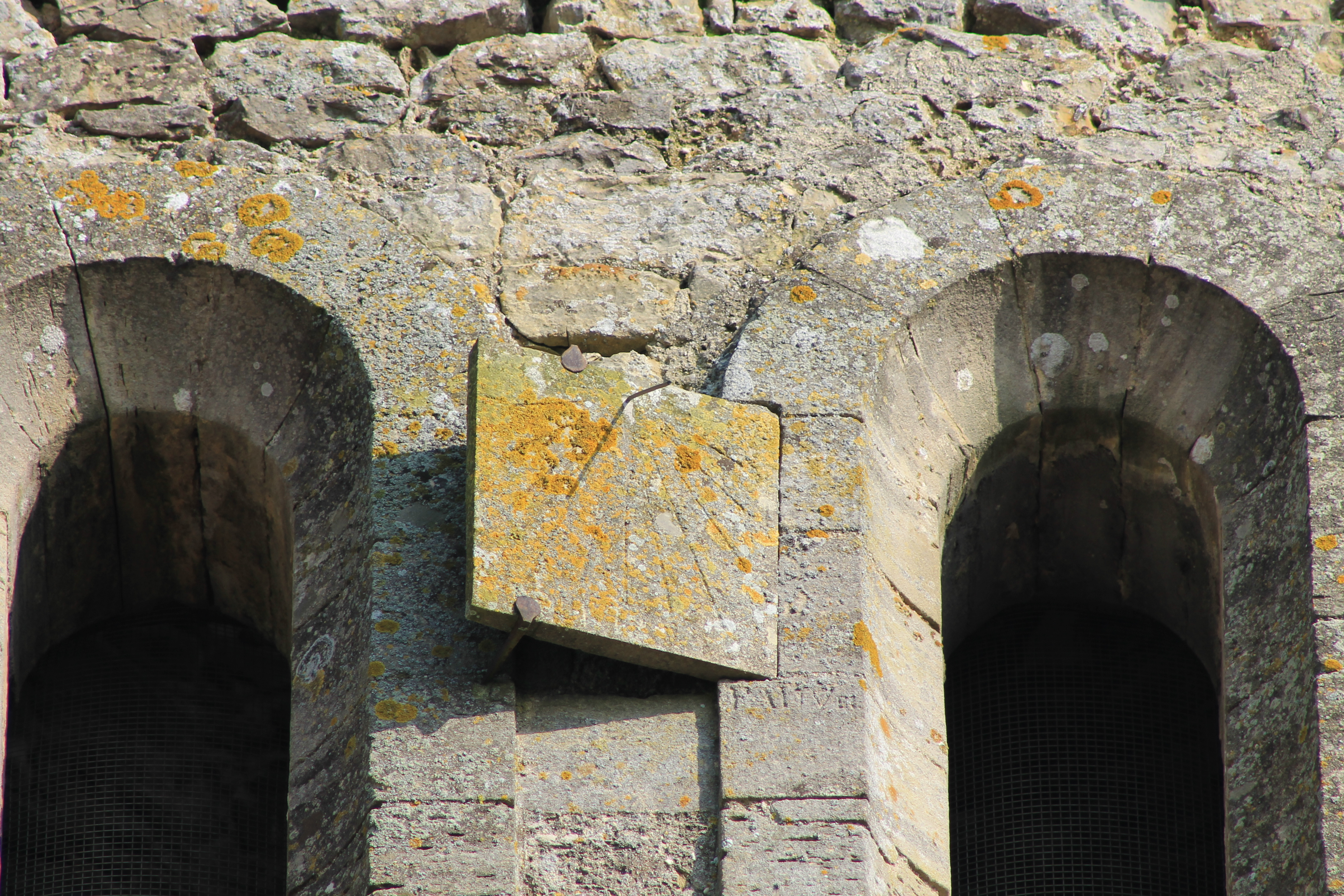 Petit cadran solaire (daté?) sur le clocher de l'église Saint-Pierre à Carcagny (Calvados)